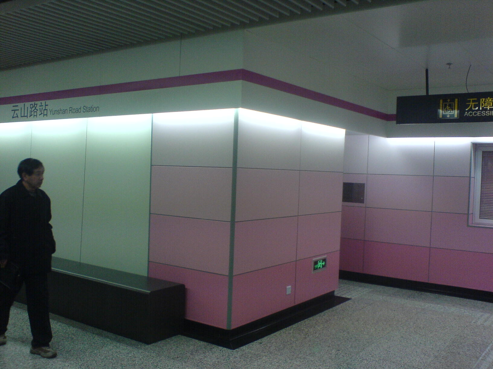 云山路站站台